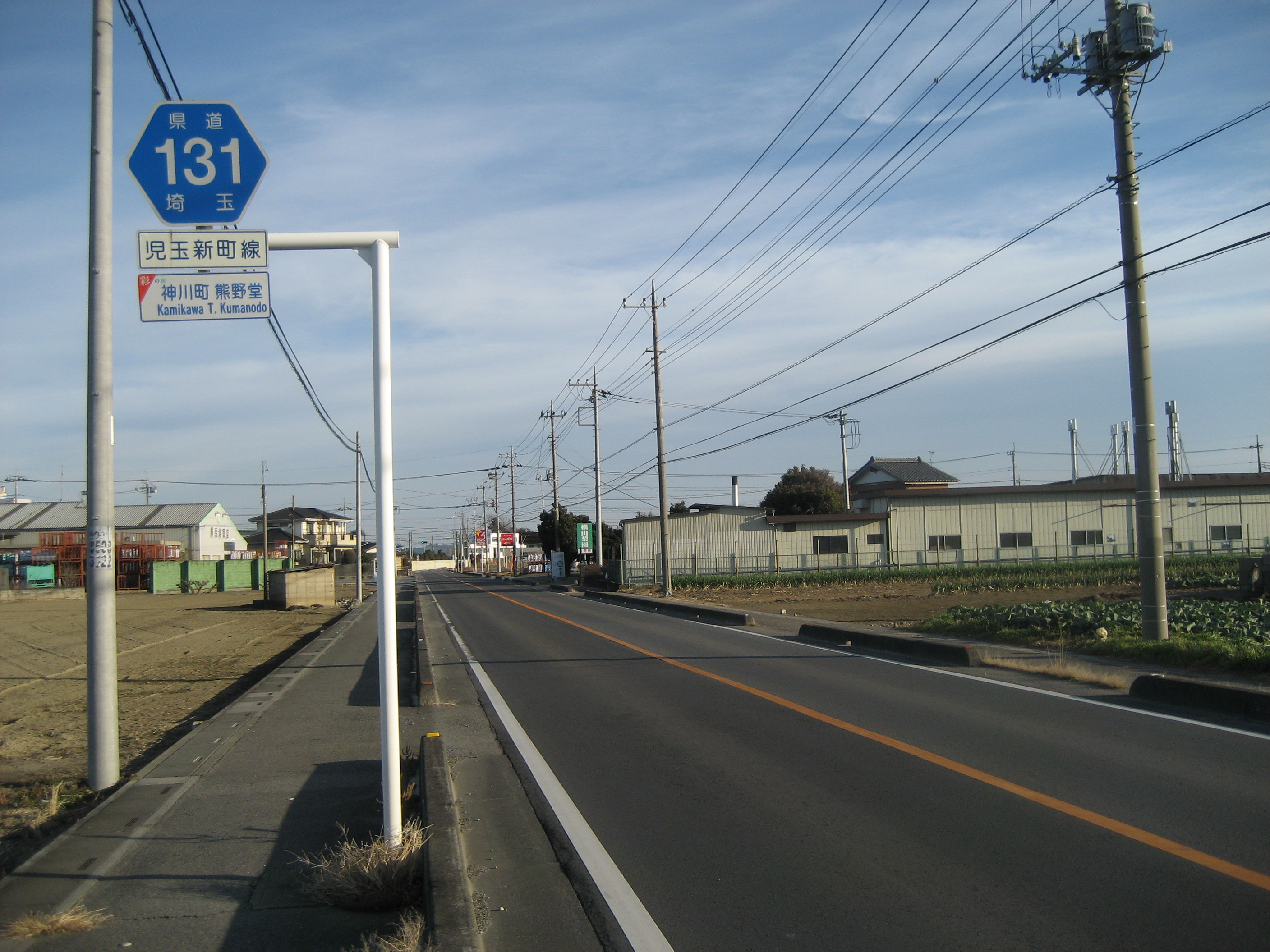 埼玉県道131号線神川町熊野堂付近